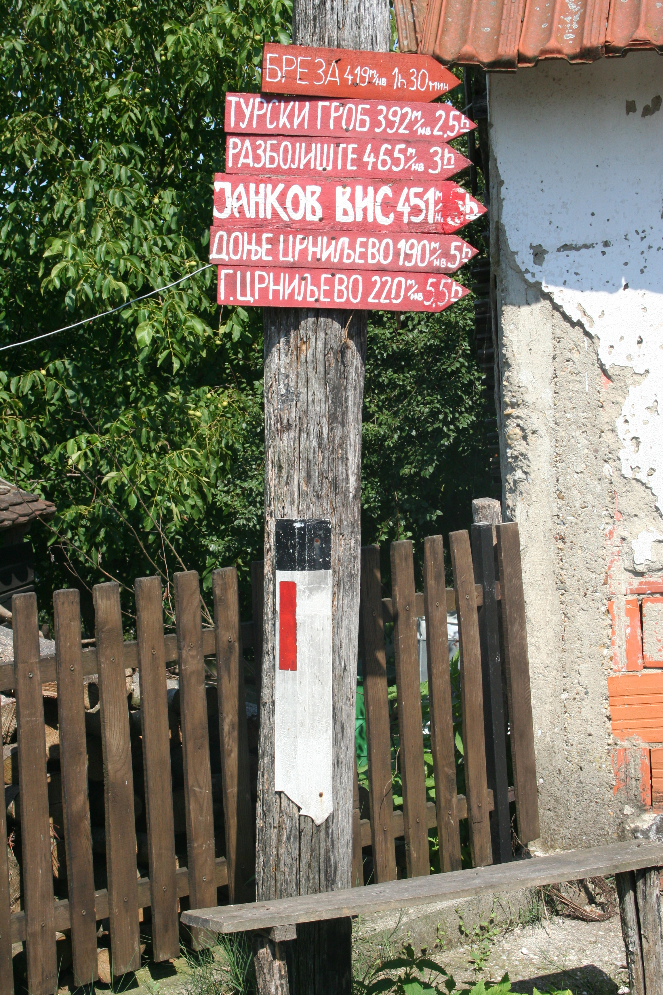 Planinarski putokaz, Donja Sipulja